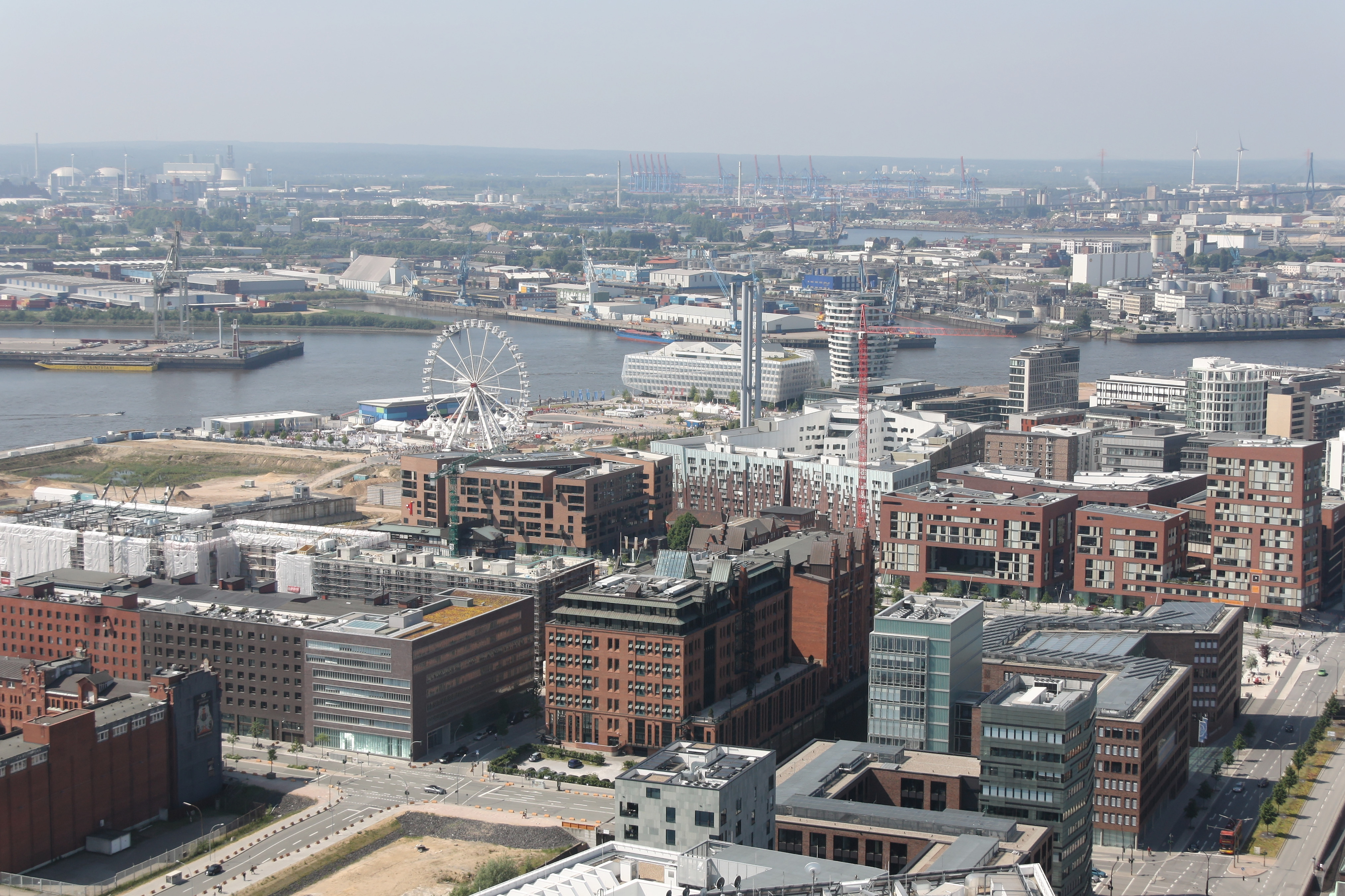 Hamburg, Blick aus dem Fesselballon Highflyer, Überseequartier